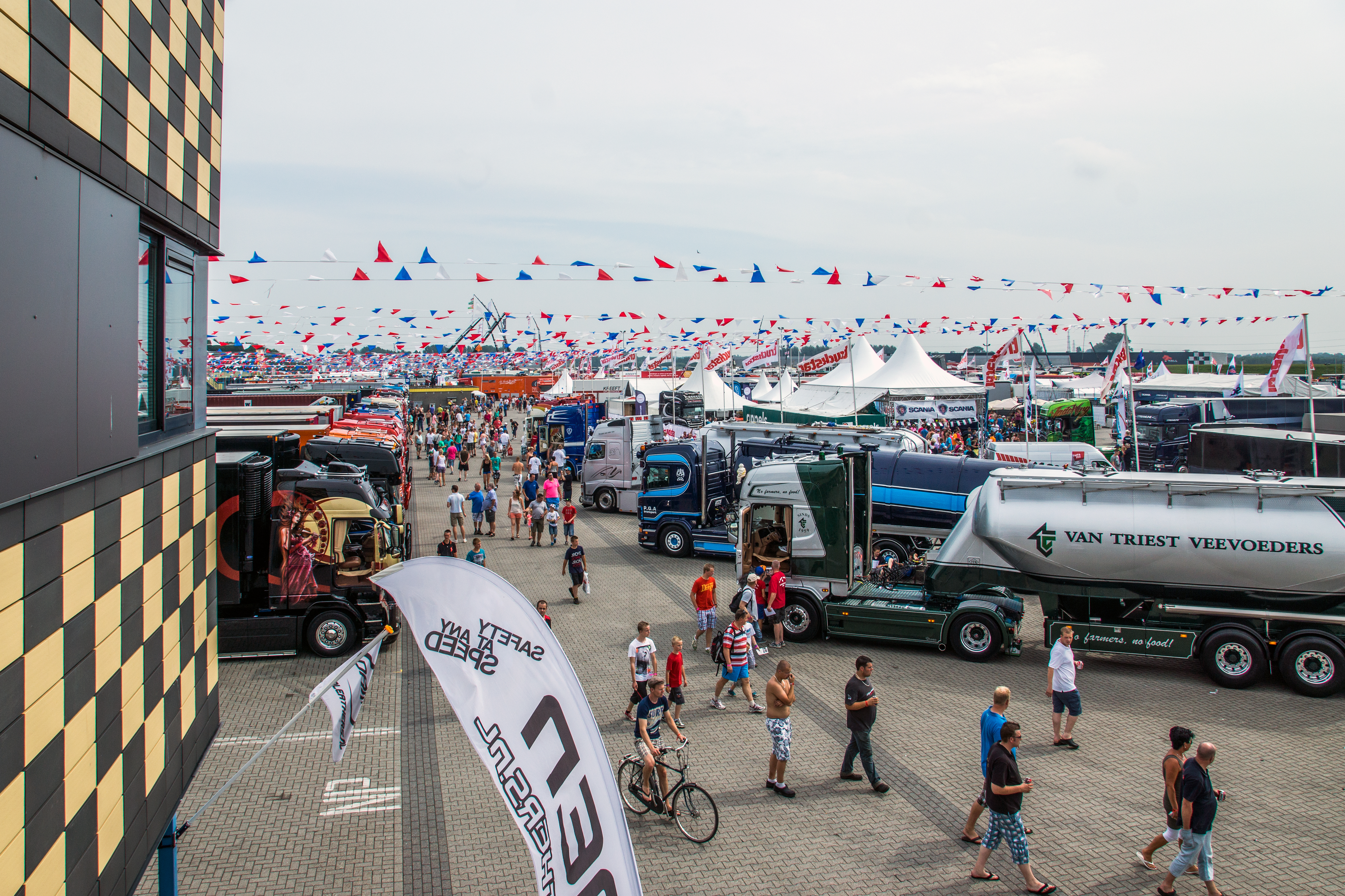 Bovenaanzicht showstraat Truckstarfestival 2013